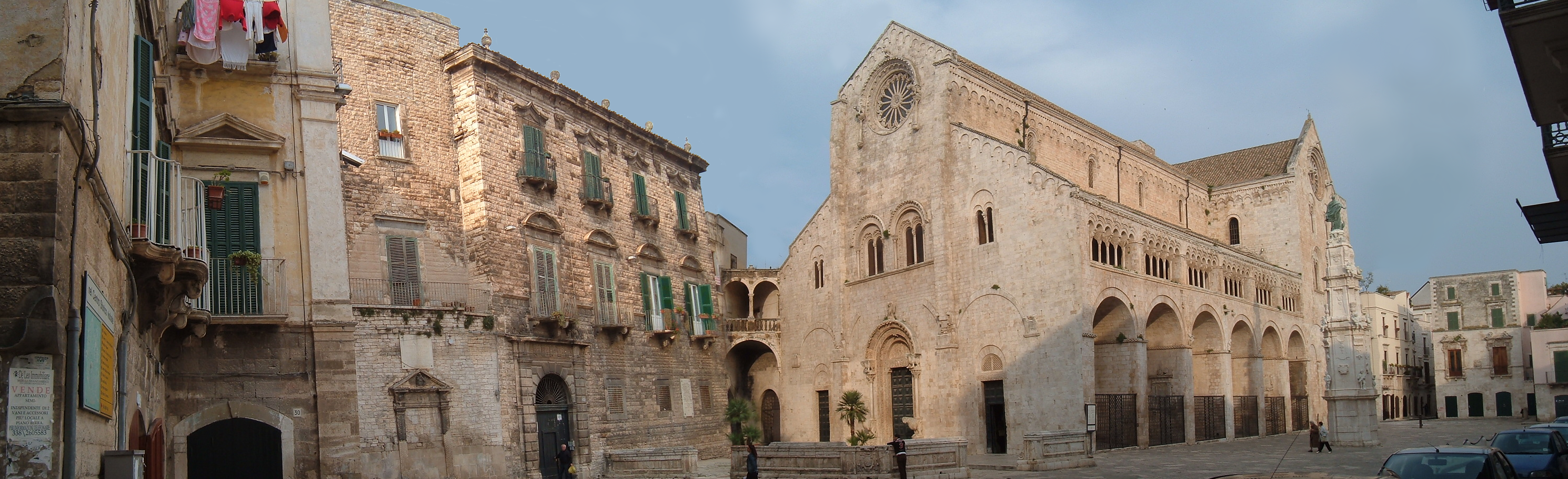 panoramica cattedrale di Bitonto